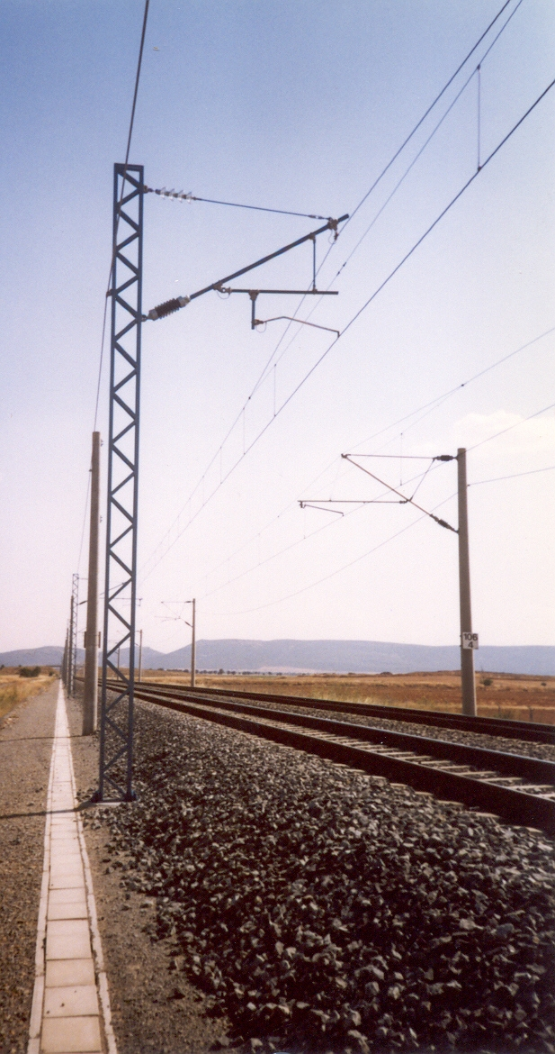 Linea Aérea de contacto con poste metálicos a la izquierda y de hormigón armado a la derecha. En el Tramo Mascaraque - El Emperador , en la línea de Altqa velocidad Madrid-Sevilla (ADIF)